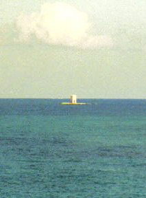 veduta della torre medievale della Meloria presso le omonime secche al largo di Livorno